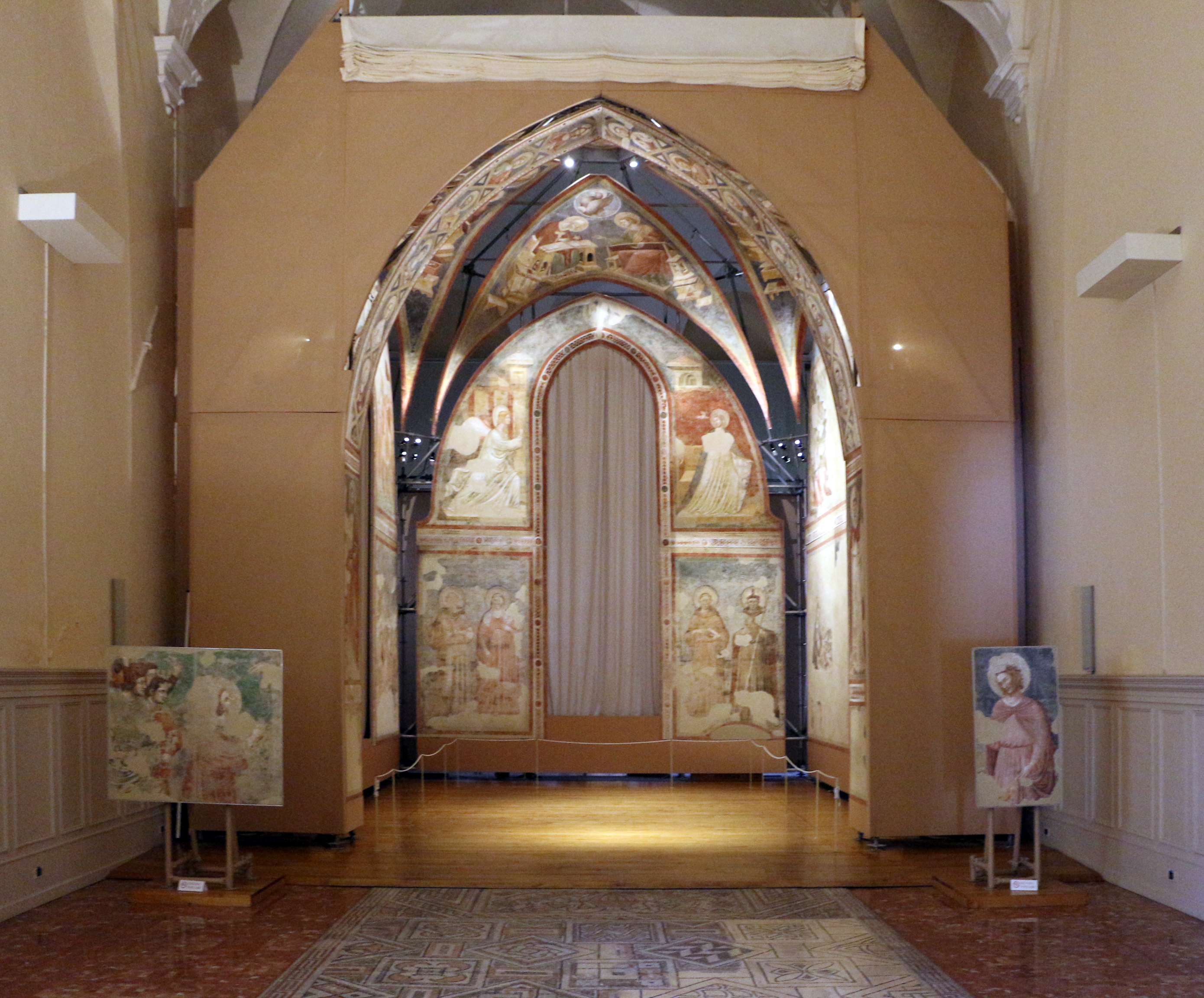 Museo nazionale di Ravenna This is a photo of a monument which is part of cultural heritage of Italy.